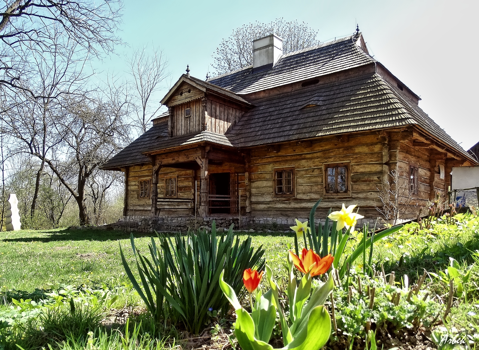 Dworek "Zacisze" w Miechowie